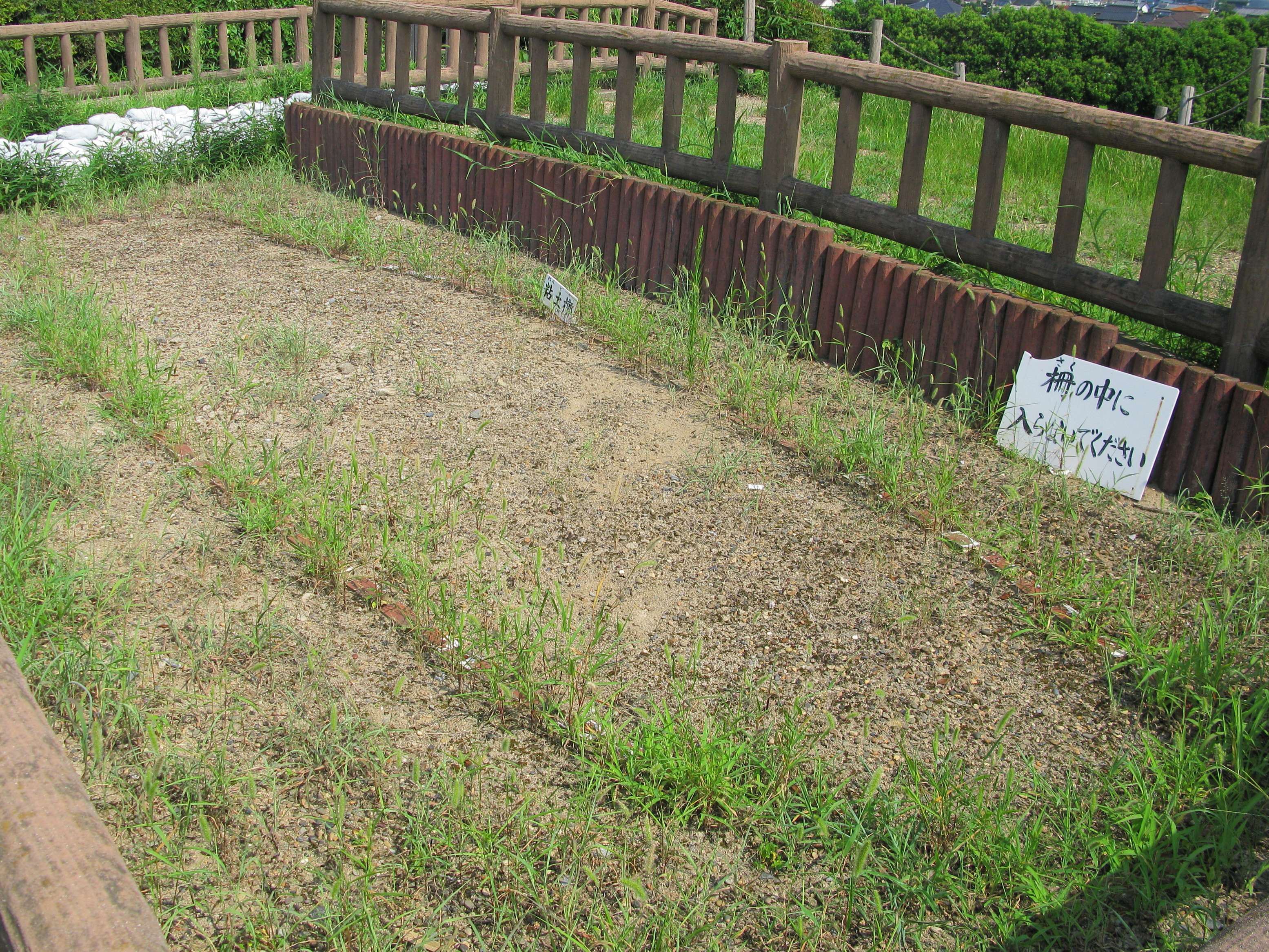 Lehmpackung des Holzsarges am Inariyama Kofun in Gyoda